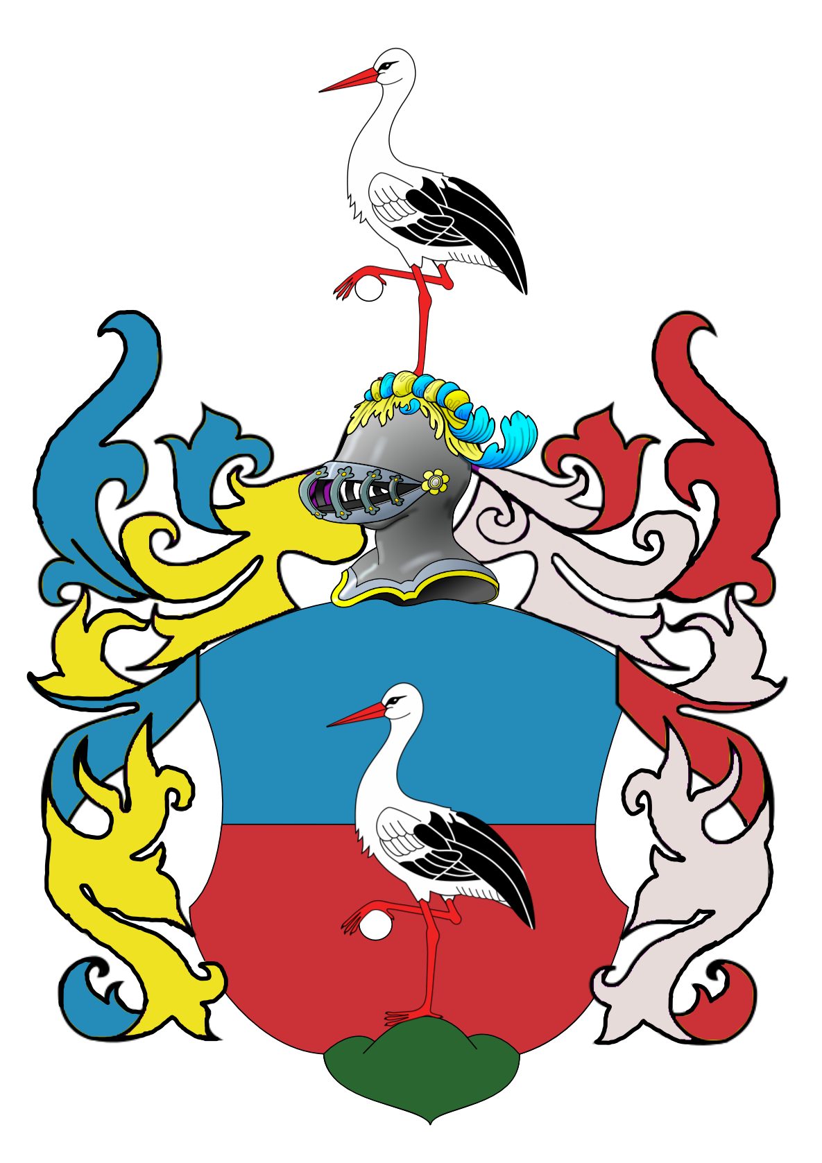 erb rodu Móroczovcov